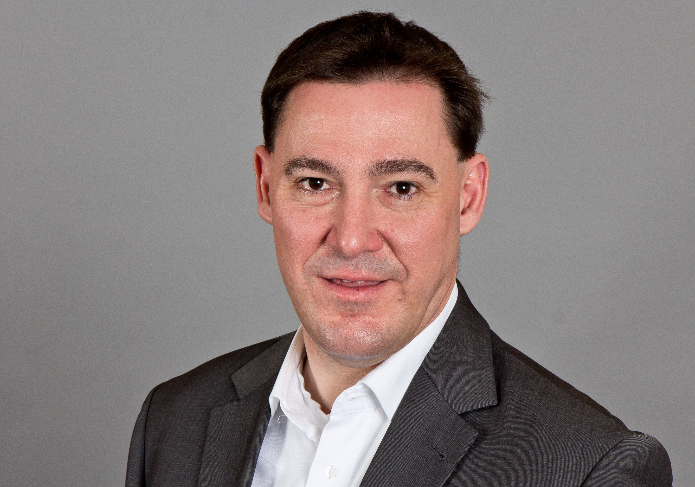 Alexander Fuhr (* 5. Januar 1969 in Dahn) ist ein deutscher Politiker (SPD) und Mitglied des Landtages von Rheinland-Pfalz. Landtag Rheinland-Pfalz 2014 19. bis 20. Februar 2014 in MainzDieses Foto wurde im Rahmen des Projektes „WIKI loves parliaments/Landtag Rheinland-Pfalz“ erstellt. Fragen zur Nachnutzung Wenn Sie Fragen zur Nachnutzung dieses Bildes haben, können Sie sich jederzeit gern an wenden